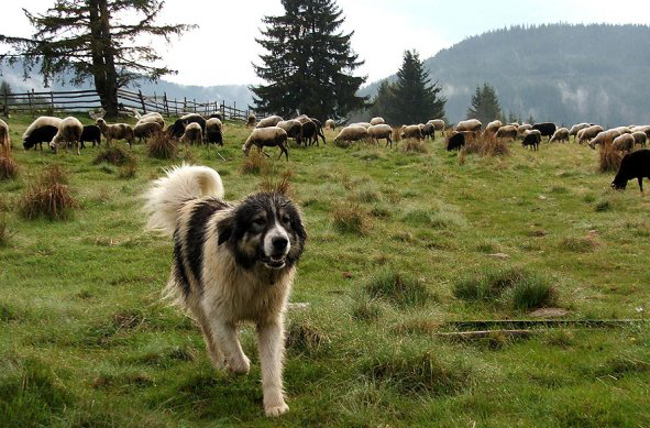 Каракачанско куче в естествената му работна среда